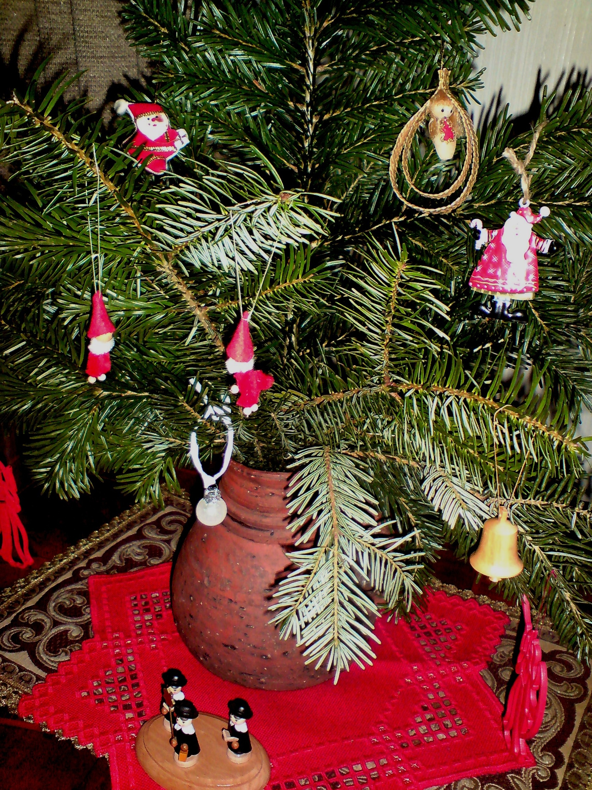 Adventsschmuck